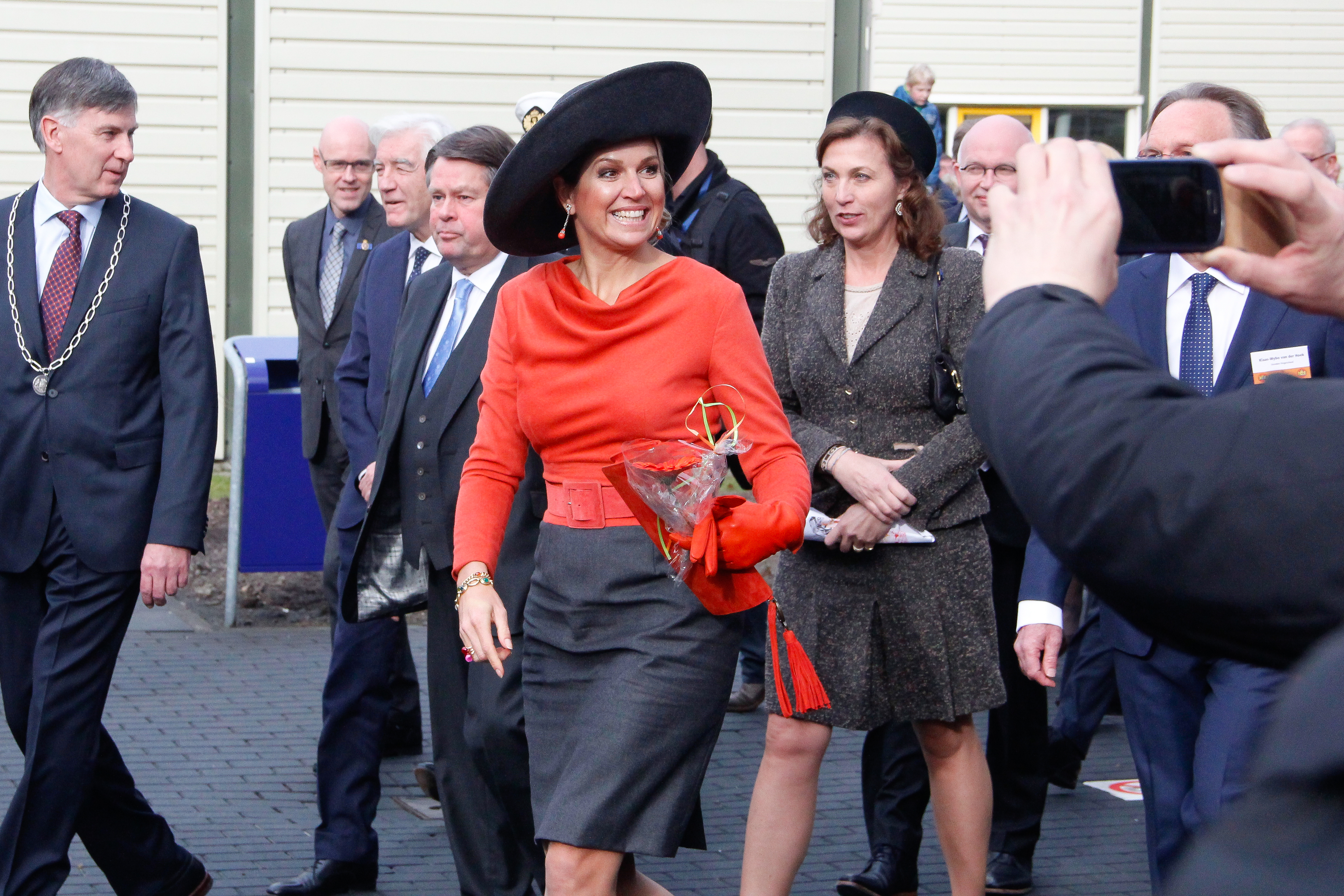 Bezoek Koning Willem-Alexander en Koningin Maxima aan Emmen in 2015 (met daarachter Bibi den Beer Poortugael)